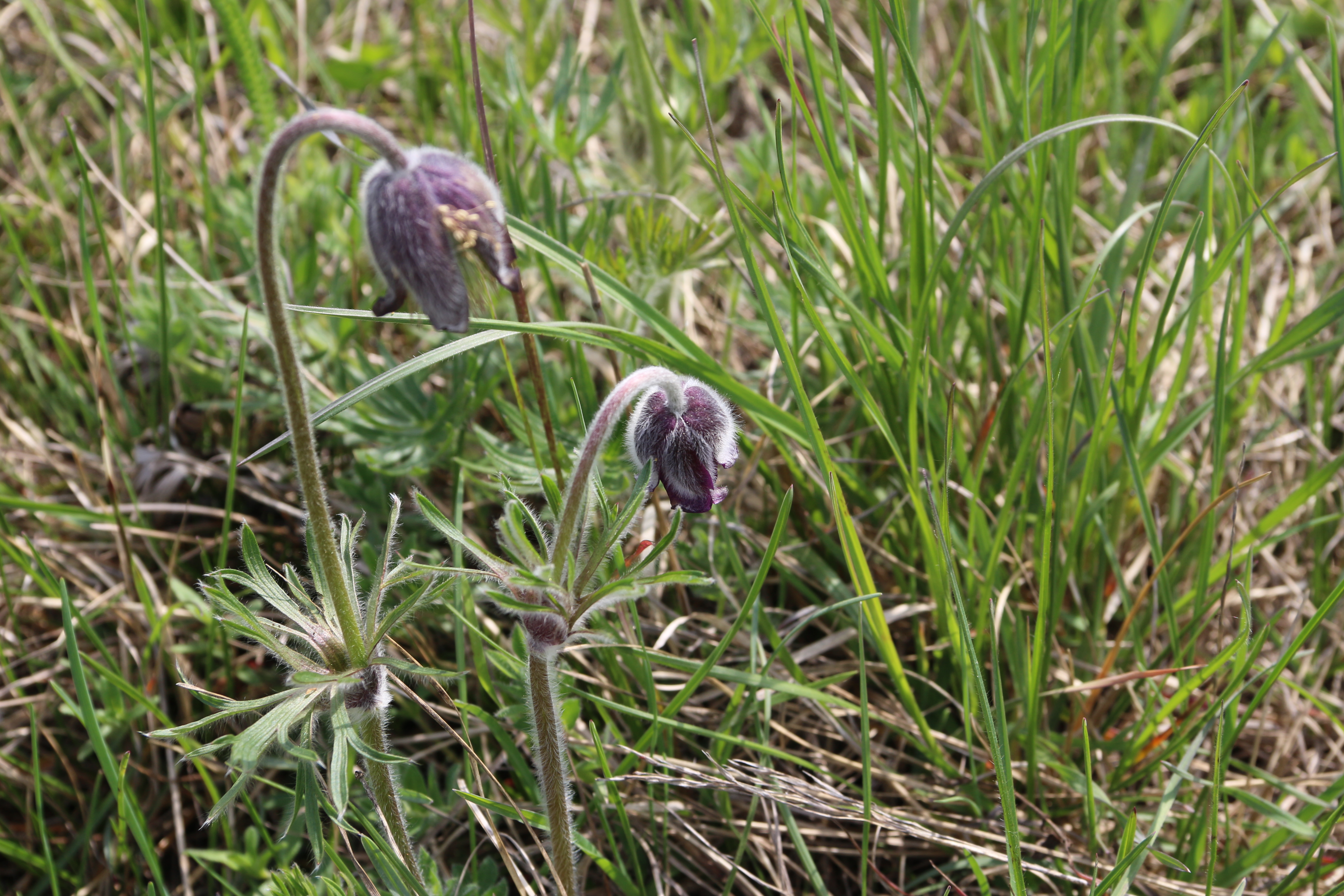 Kuhschellenwiese, Gemeinde Enzesfeld-Lindabrunn, Niederösterreich. This media shows the natural monument in Lower Austria with the ID BN-161.